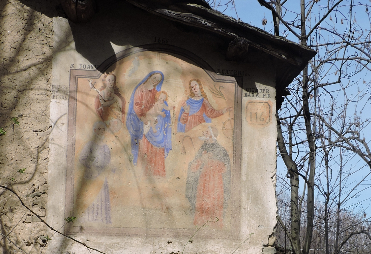 Gambasca (CN), borgata Castinel: dipinto di Giuseppe Gautieri, 1866